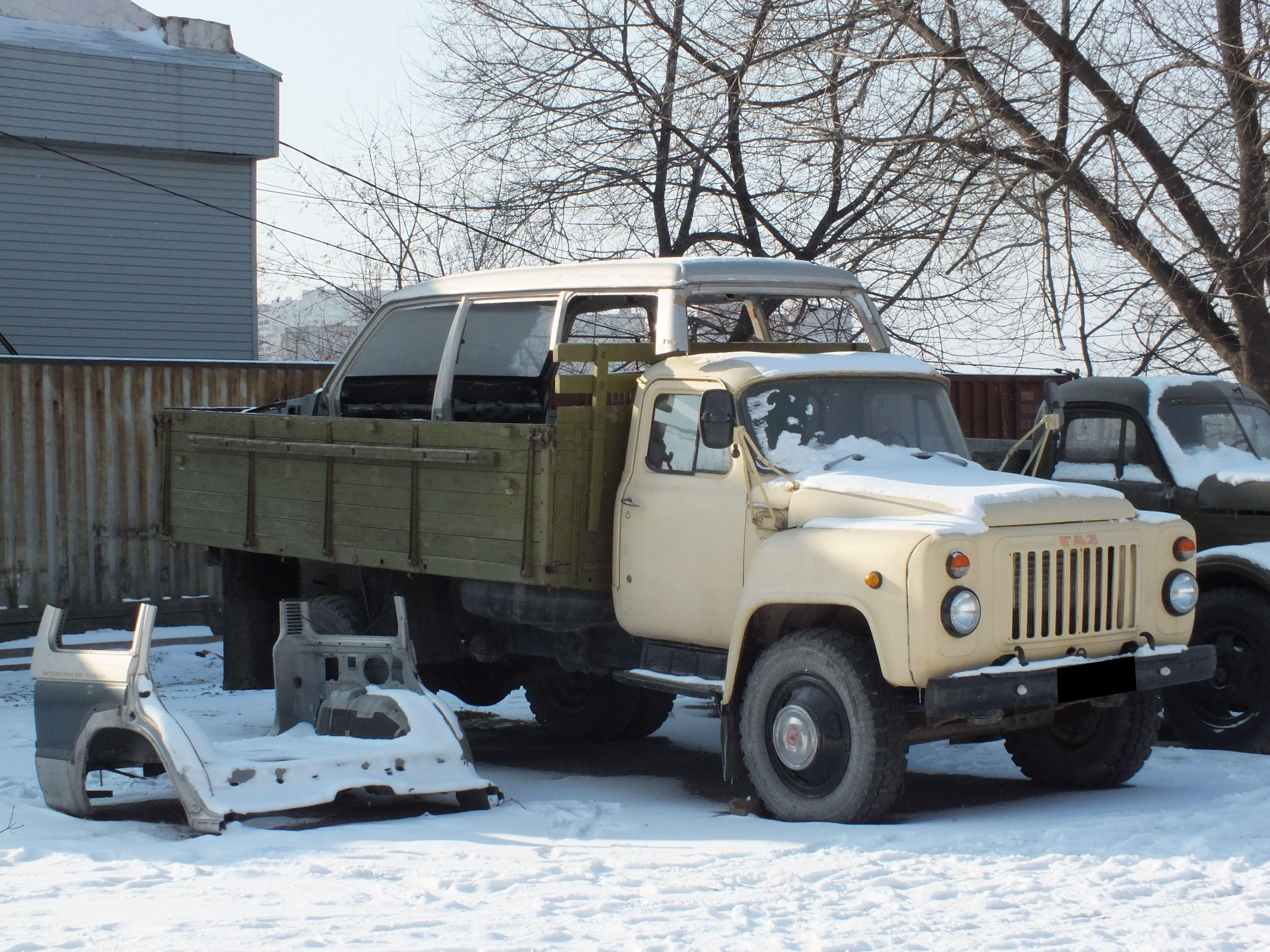 ГАЗ-53 и распил японского автомобиля в кузове